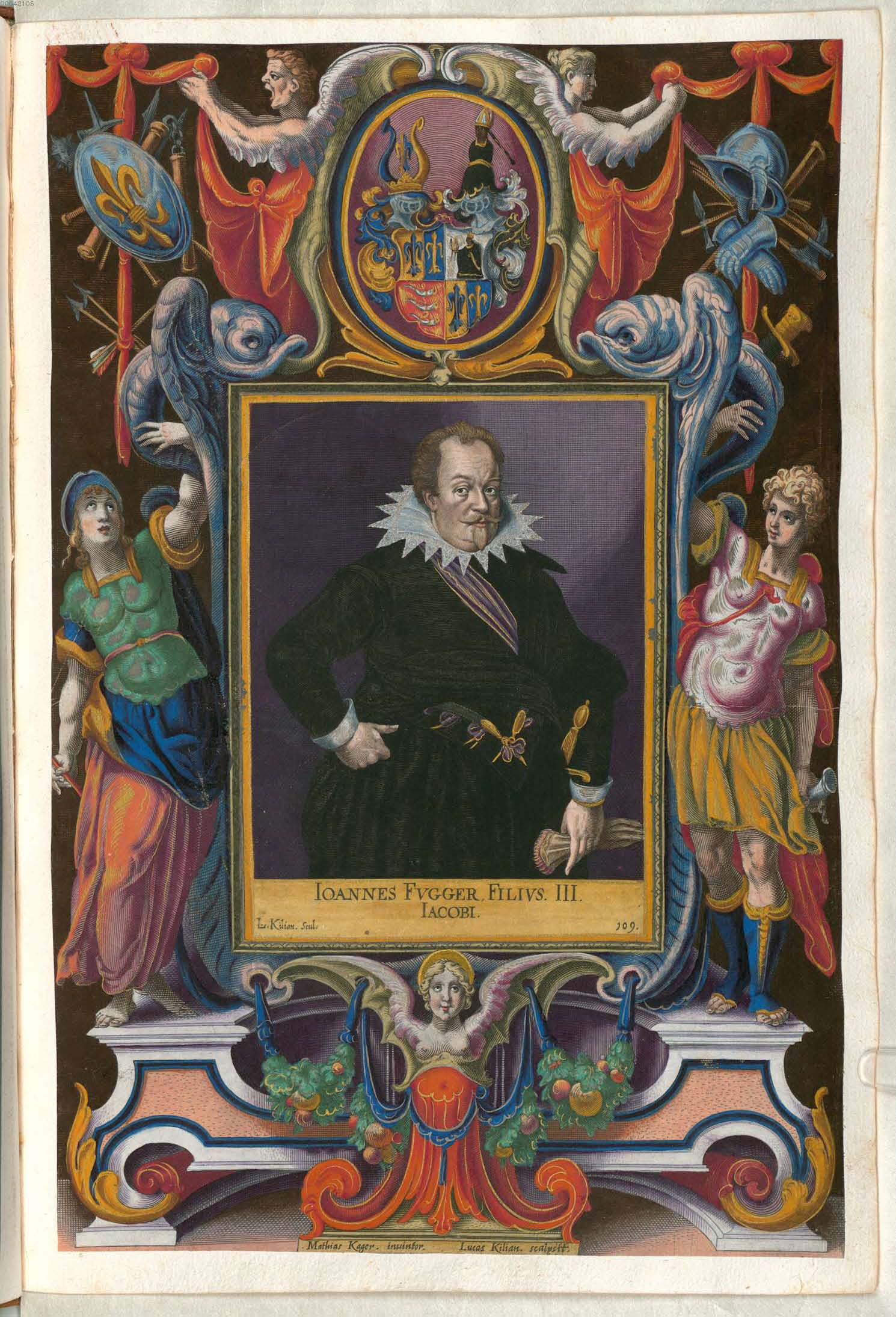 Fuggerorum et Fuggerarum imagines wurde 1588 von Philipp Eduard Fugger beim Kupferstecher Dominicus Custos in Auftrag gegeben. Das Werk enthält mit Aquarell- und Gouache-Farbe kolorierte Stiche der Mitglieder der Fugger von der Lilie. Der Druck von 1618 stellt das einzige kolorierte Exemplar dar.